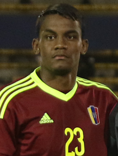 Quito, 2 feb (Andes).- La selección juvenil de Venezuela goleó 4-2 este jueves a su par de Ecuador, que comprometió seriamente sus opciones de clasificar al Campeonato Mundial Sub 20 Corea del Sur 2017, que se desarrollará en mayo próximo. ANDES/Micaela Ayala V.